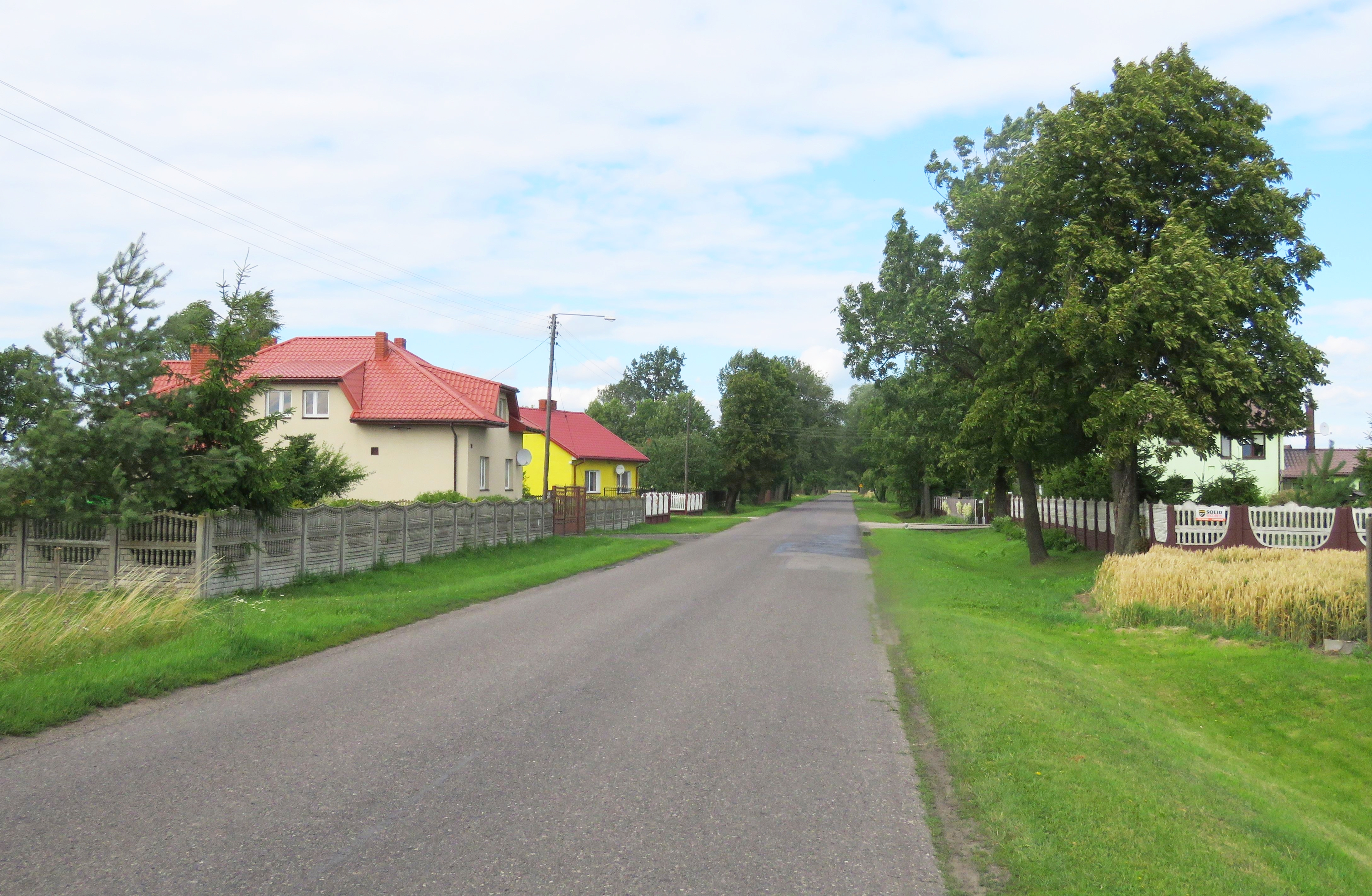 Drybus